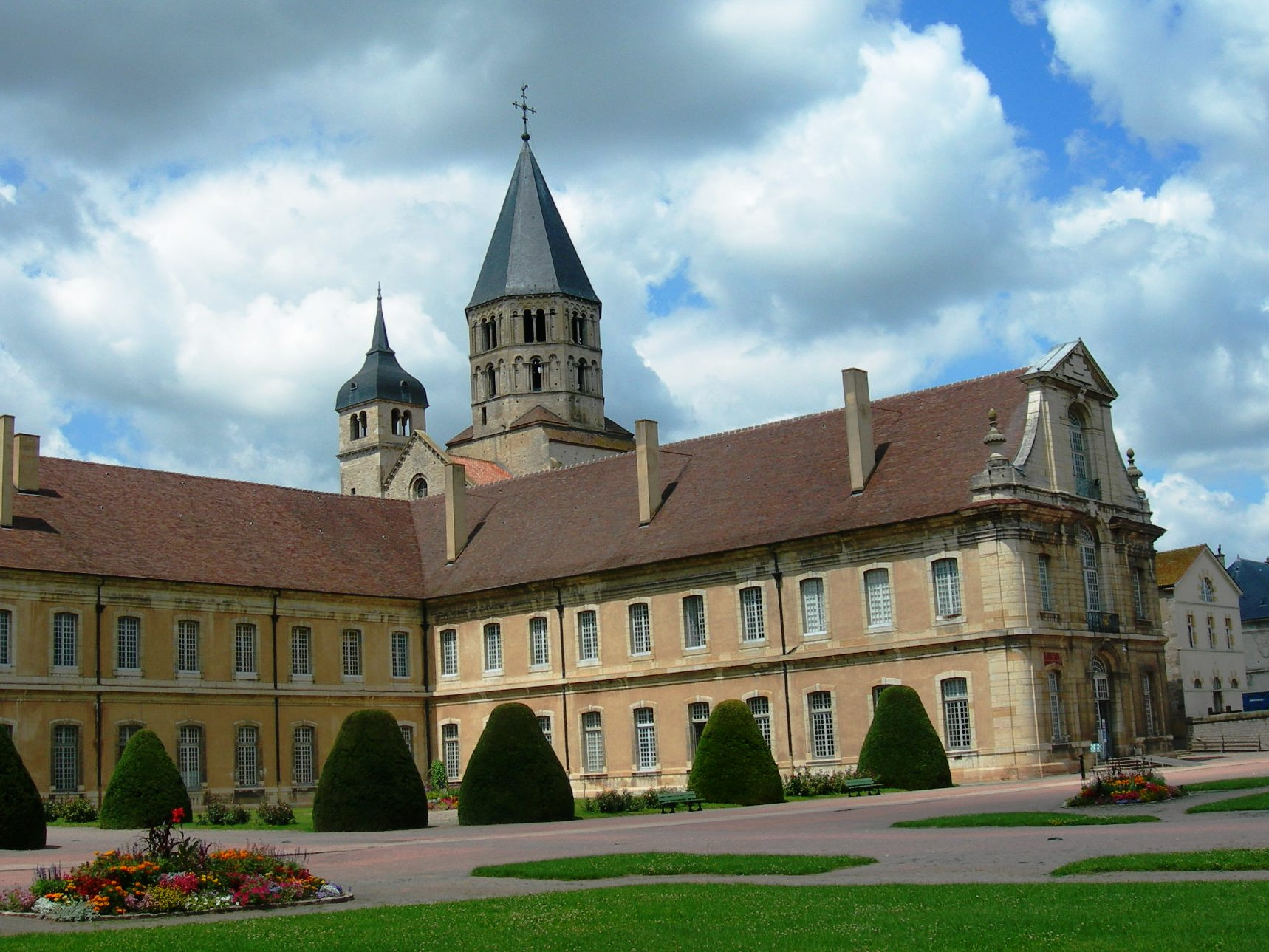 Cluny, le monastere vue d´ensemble du parc)